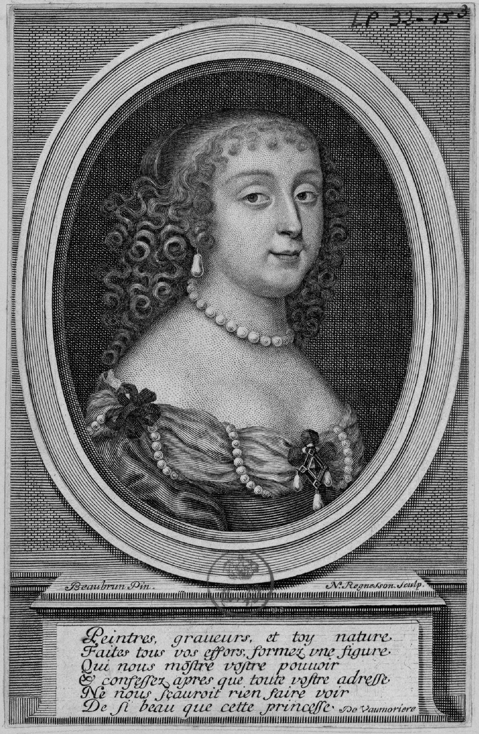 Druck mit dem Porträt Anna Maria Martinozzis, verheiratete Fürstin von Conti